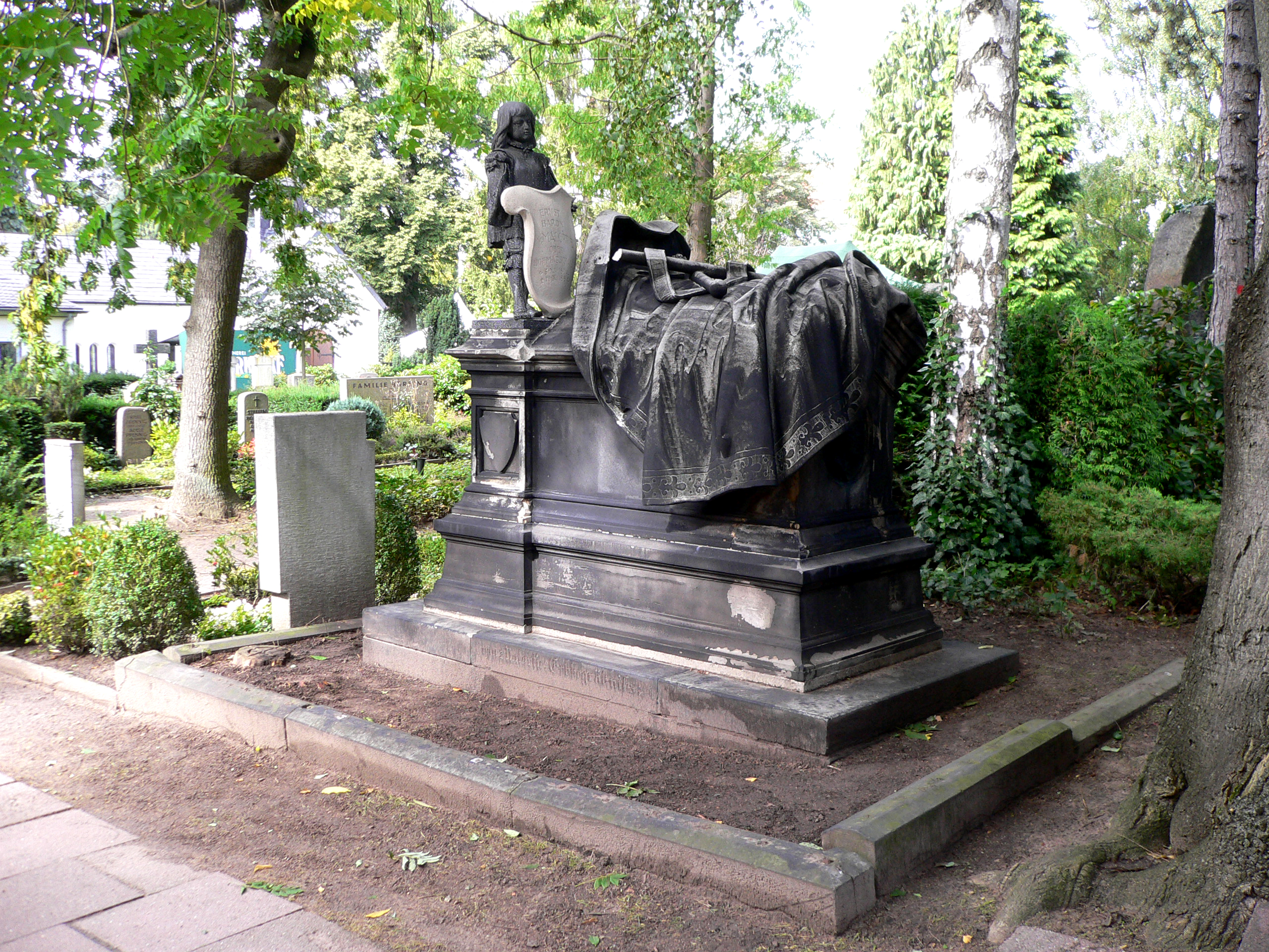 Grabmal mit der Sockel-Inschrift "von Malortie, Erbbegräbnis. Am Sandstein sind Abbrüche und nur zum Teil reparierte Abplatzer zu sehen. Der Metallzaun auf der Einfriedung rund um das Grabmal wurde abgesägt. Auf dem Grabmal eine metallene Figur, die Grabplatte aus (neuerem?) Sandstein haltend.